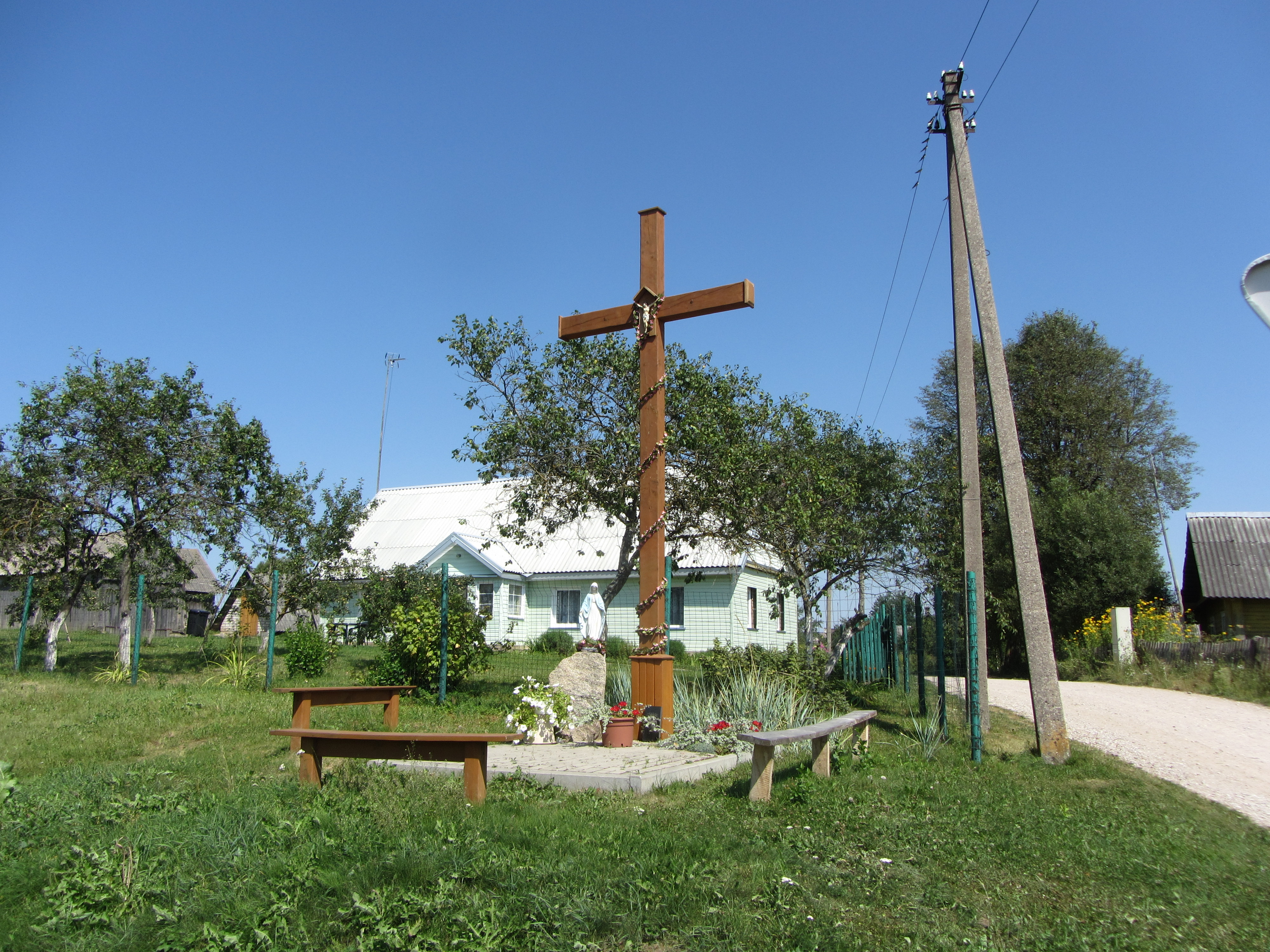 Gudeliai, Lithuania